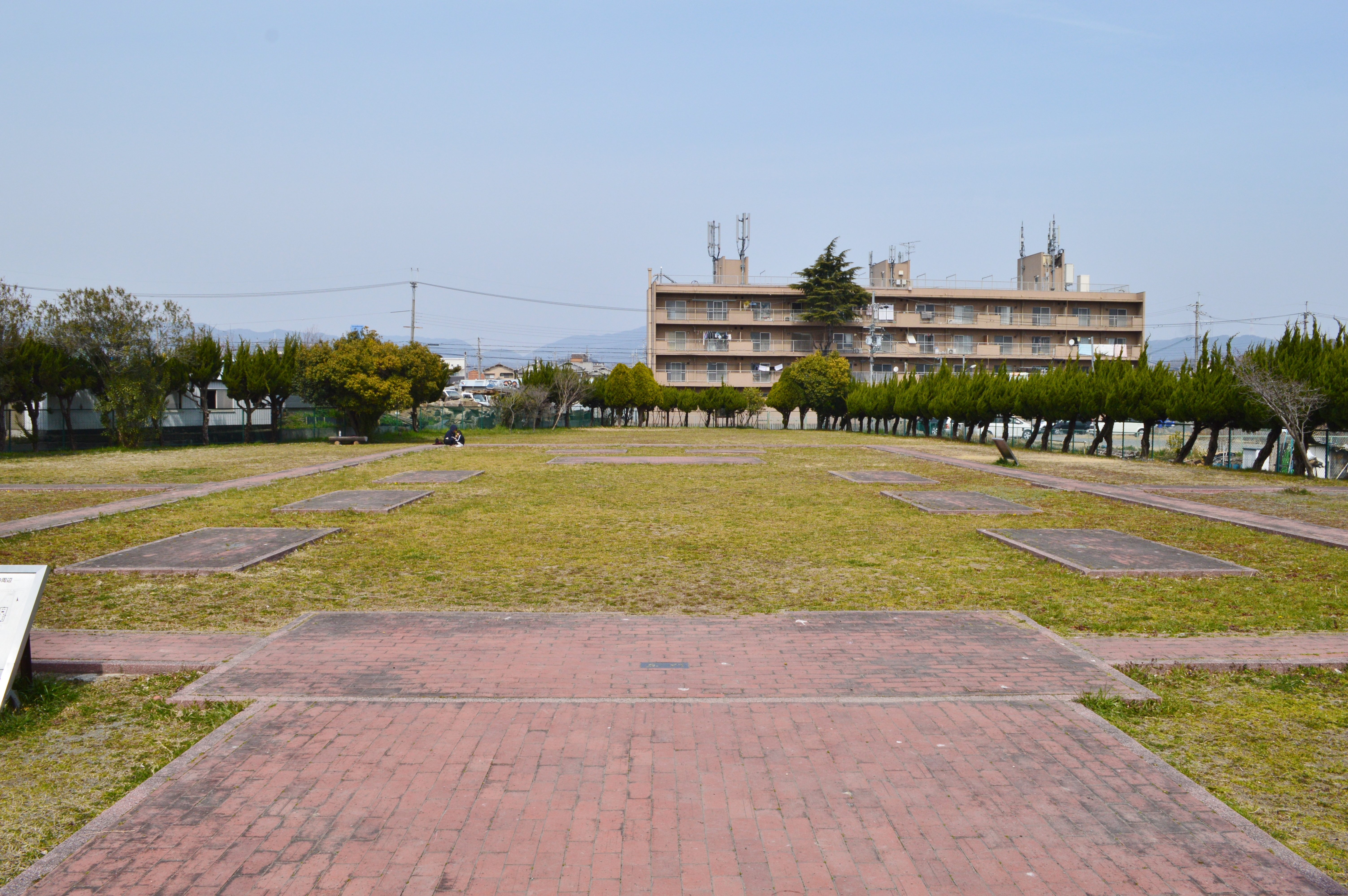 嶋上郡衙跡 全景